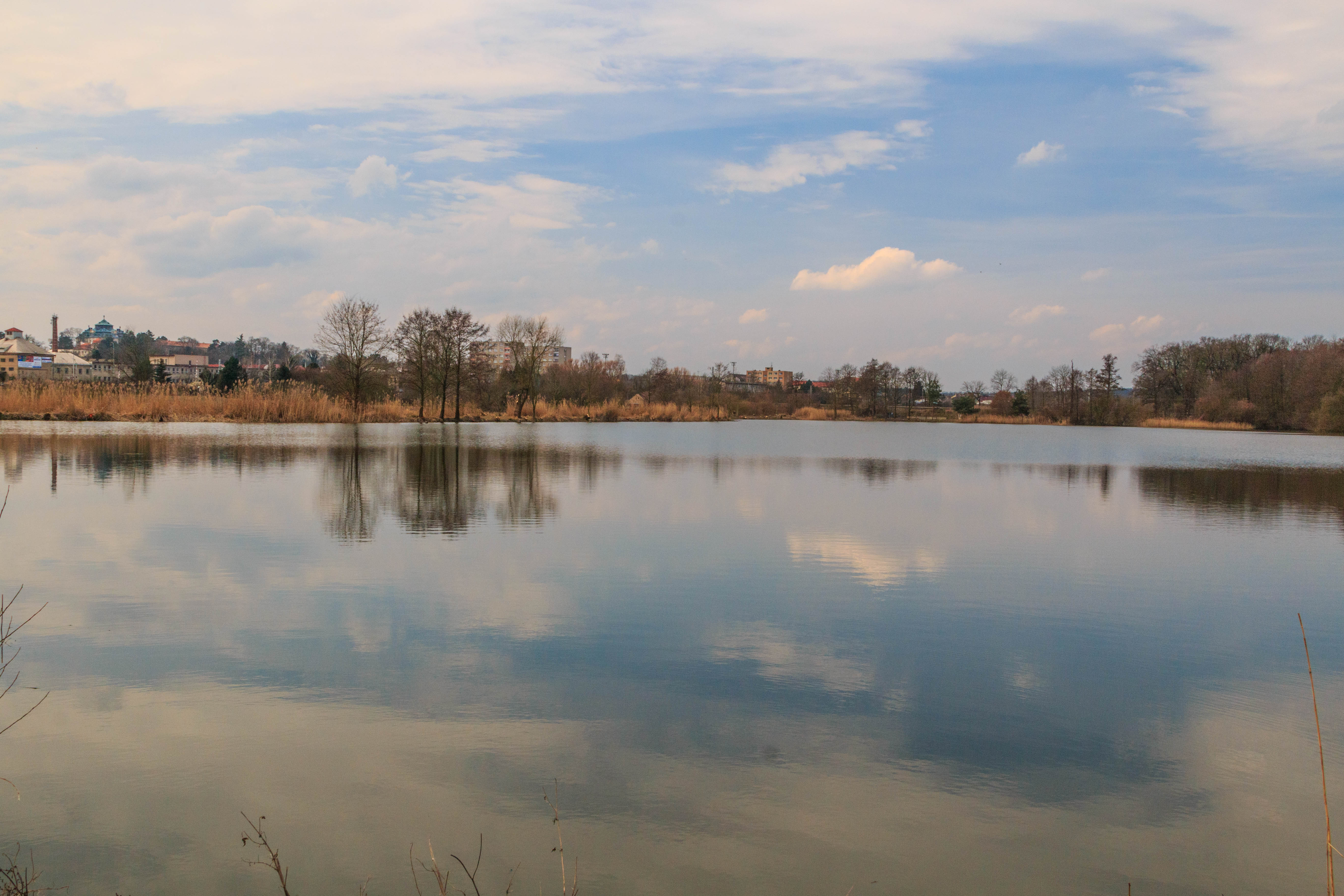 rybník Jordán u Chlumce nad Cidlinou Project: Vodstvo.